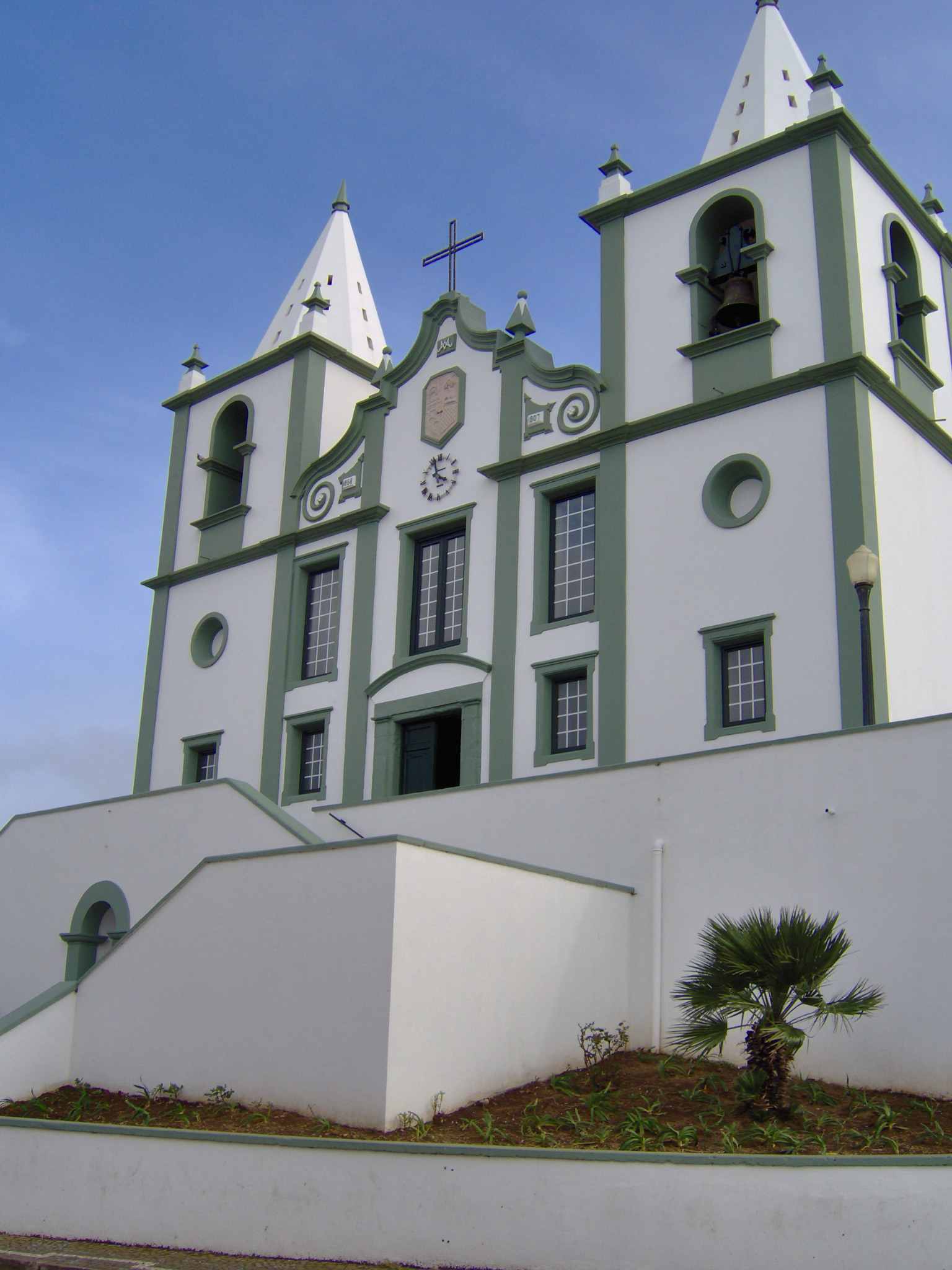 Igreja de São Francisco Xavier, Raminho, Angra do Heroísmo, Terceira, Açores